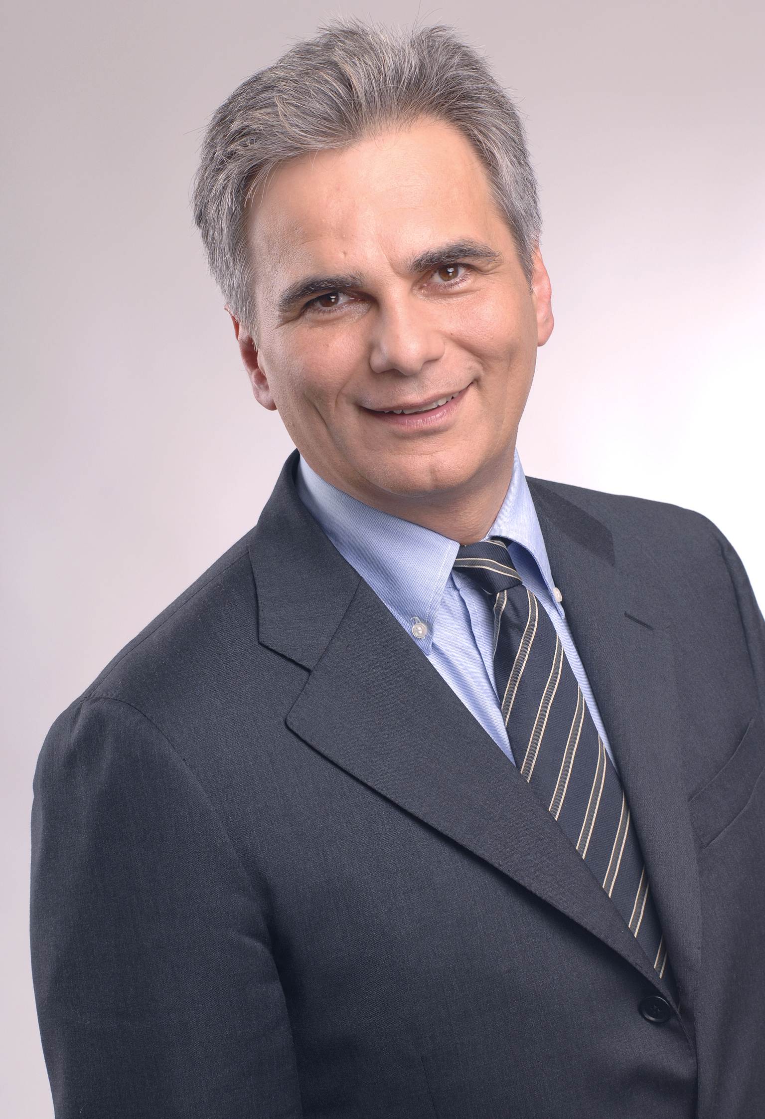 Werner Faymann. Foto: Johannes Zinner.